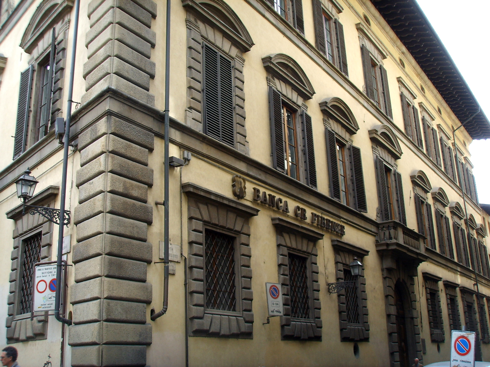 Palazzo_Incontri in Florence